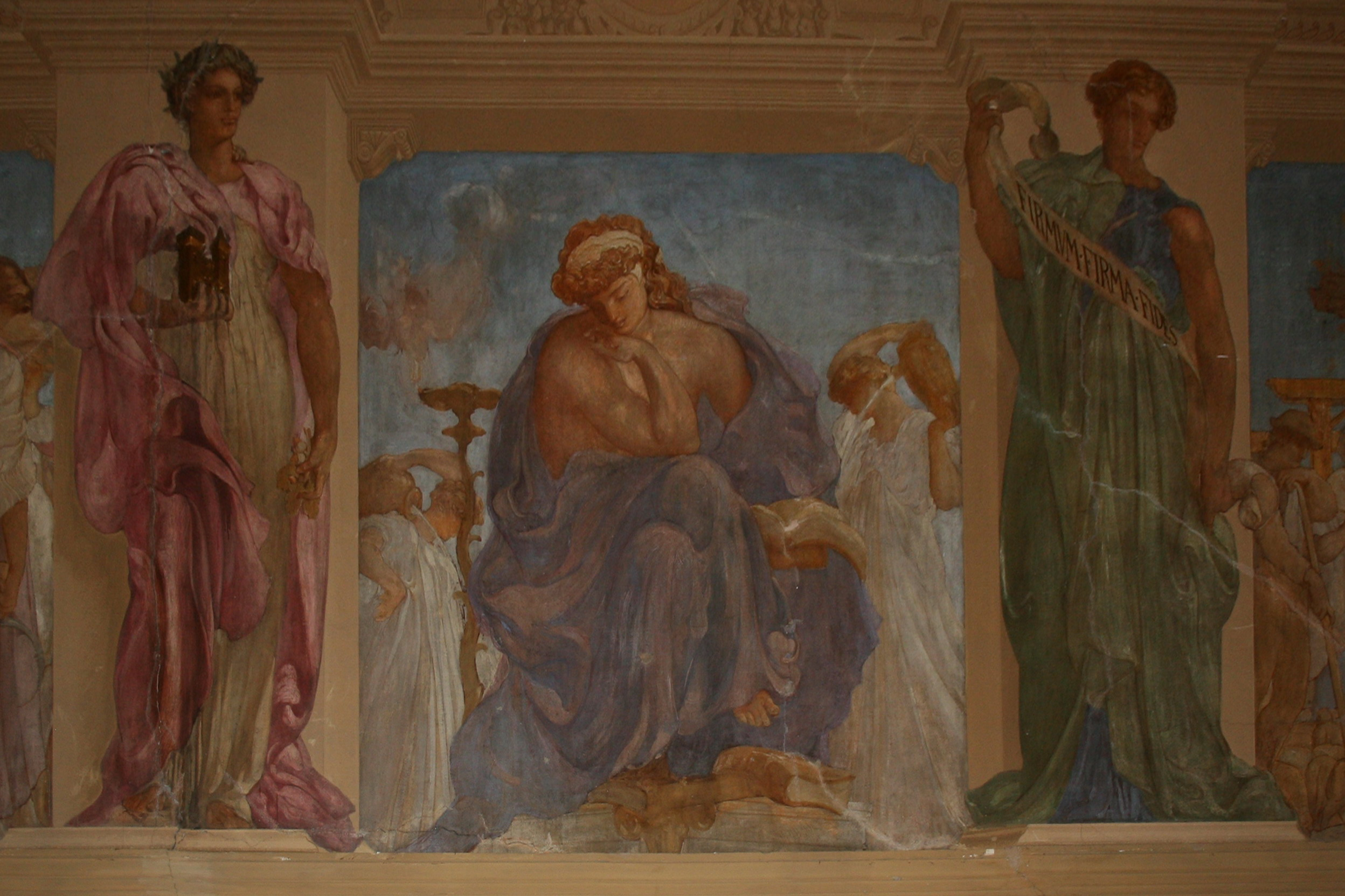 Sibilla Appenninica o Picena di Adolfo de Carolis - dipinto del salone di rappresentanza all'interno dell'alloggio